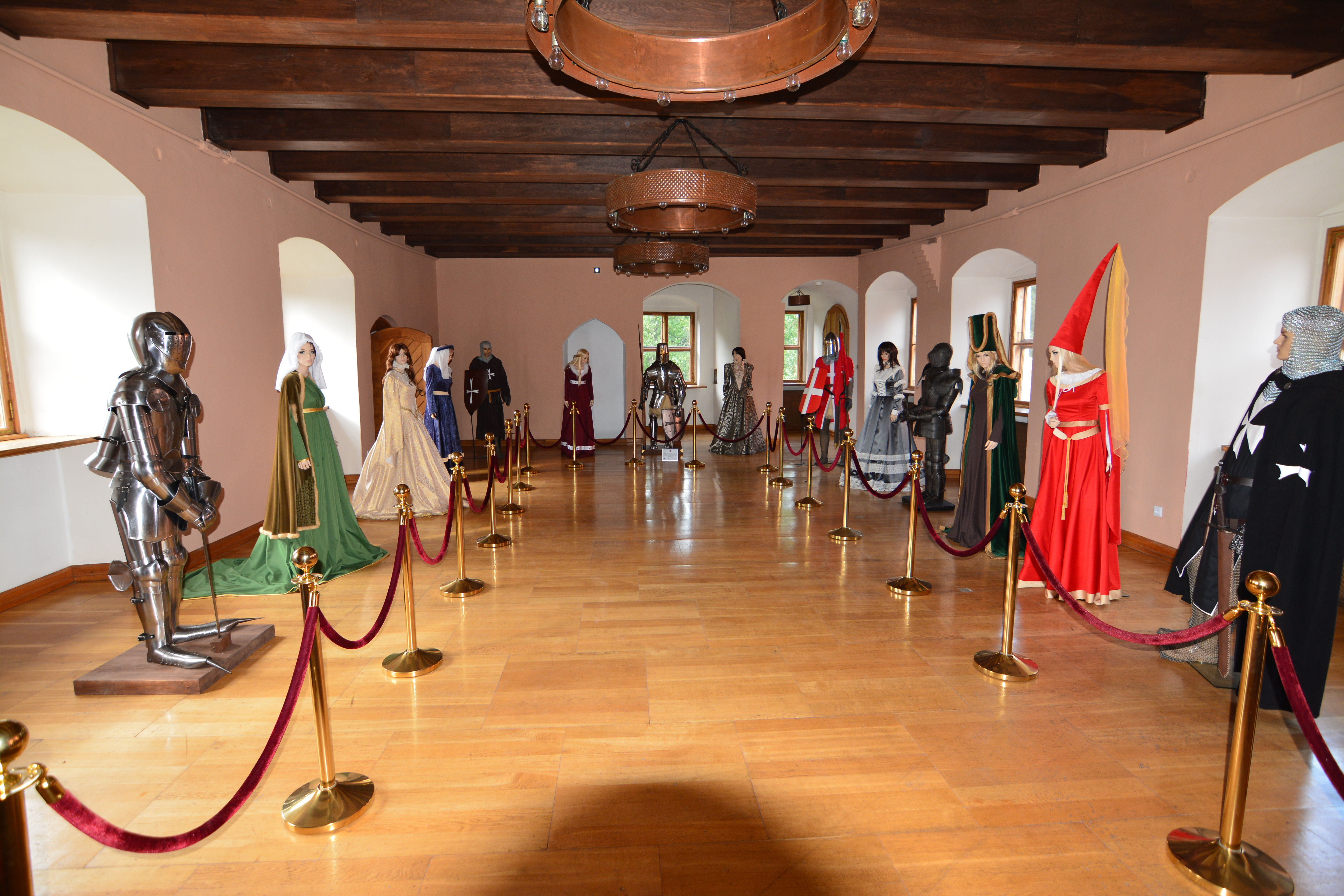 Pęzino - zamek, XIV, 1 poł. XVI, 1600, XIX